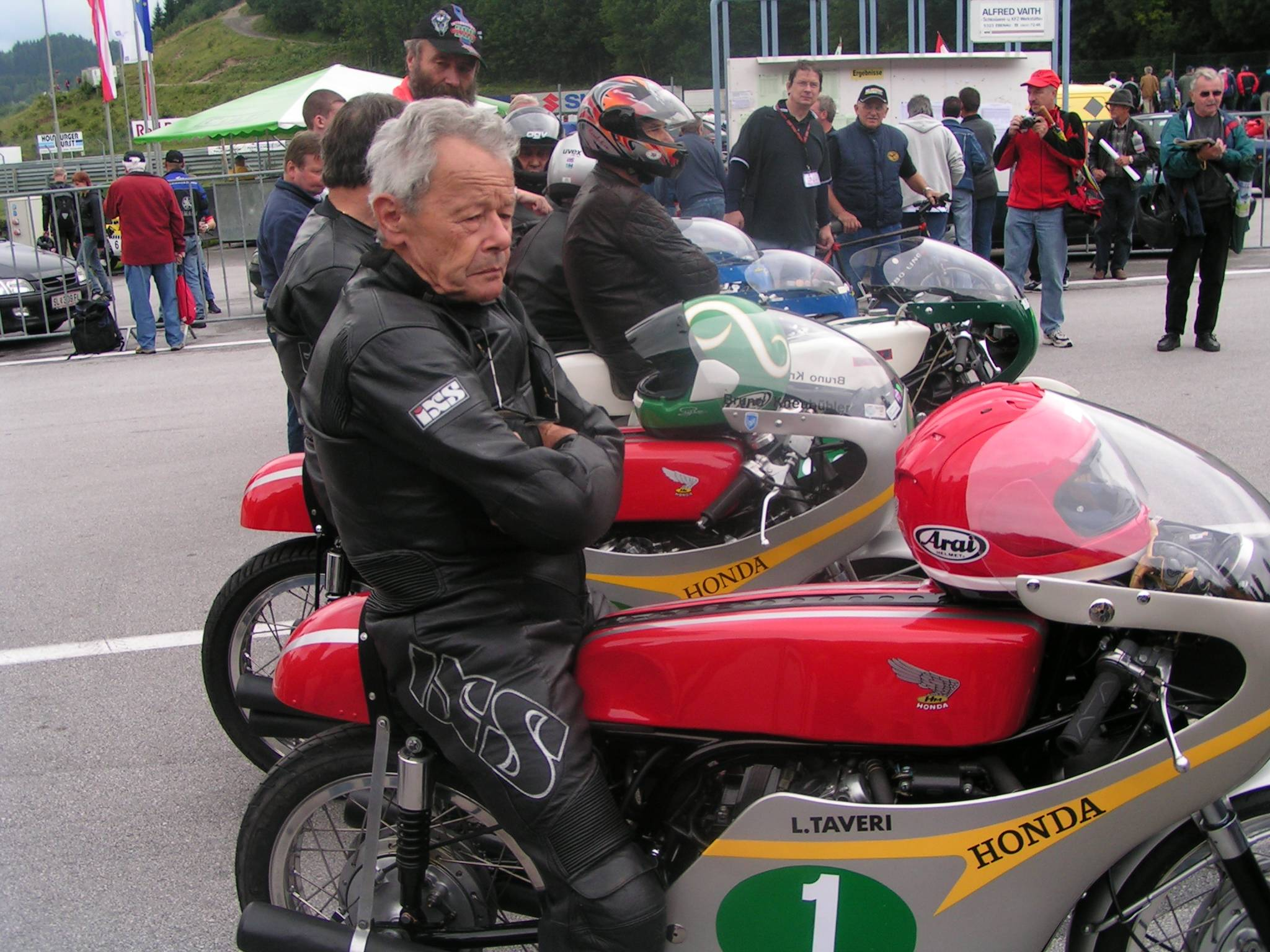 Luigi Taveri am Salzburgring